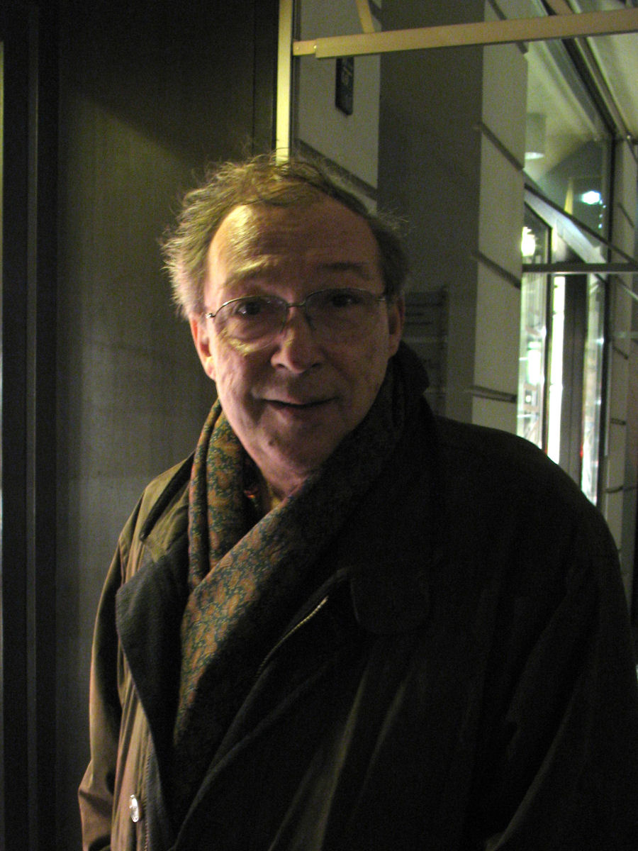 Jaecki Schwarz in der Friedrichstraße (vor Budapester Schuhe)